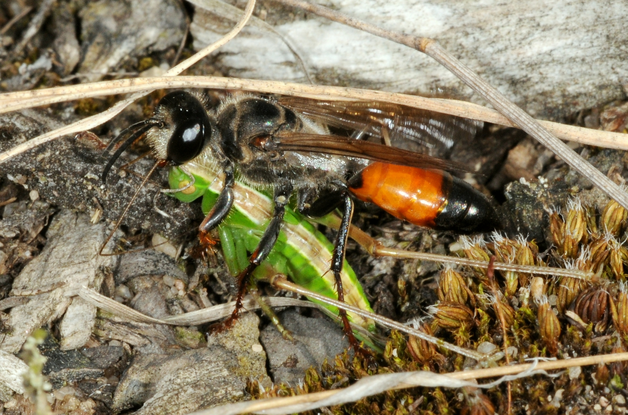 Sphex funerarius mit Metrioptera bicolor als Beute, Stromtrasse bei Kelsterbach - neben Startbahn West, Hessen, Deutschland